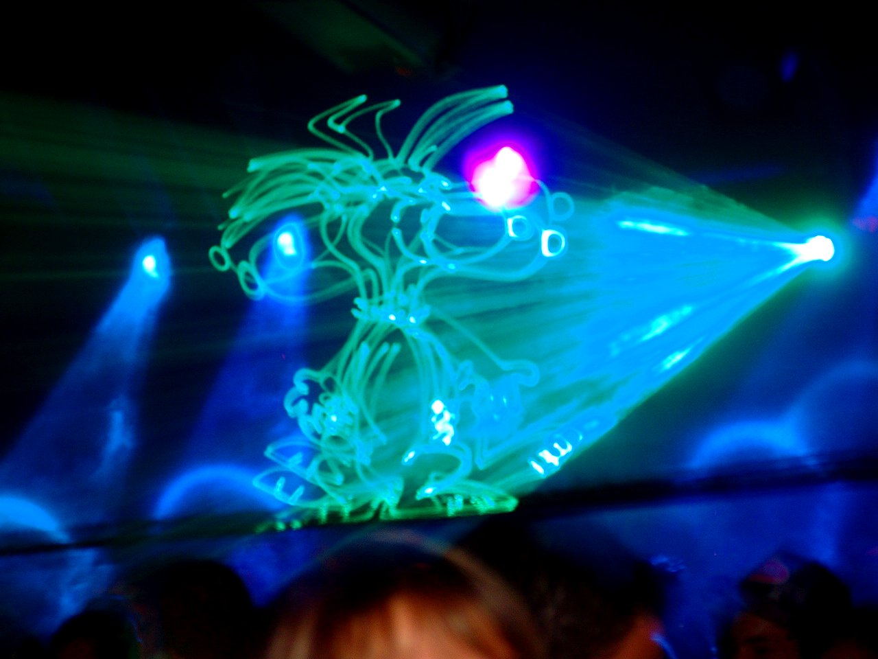 Ein mit Laser projizierter Snoopy @ OXA, Zürich Oerlikon